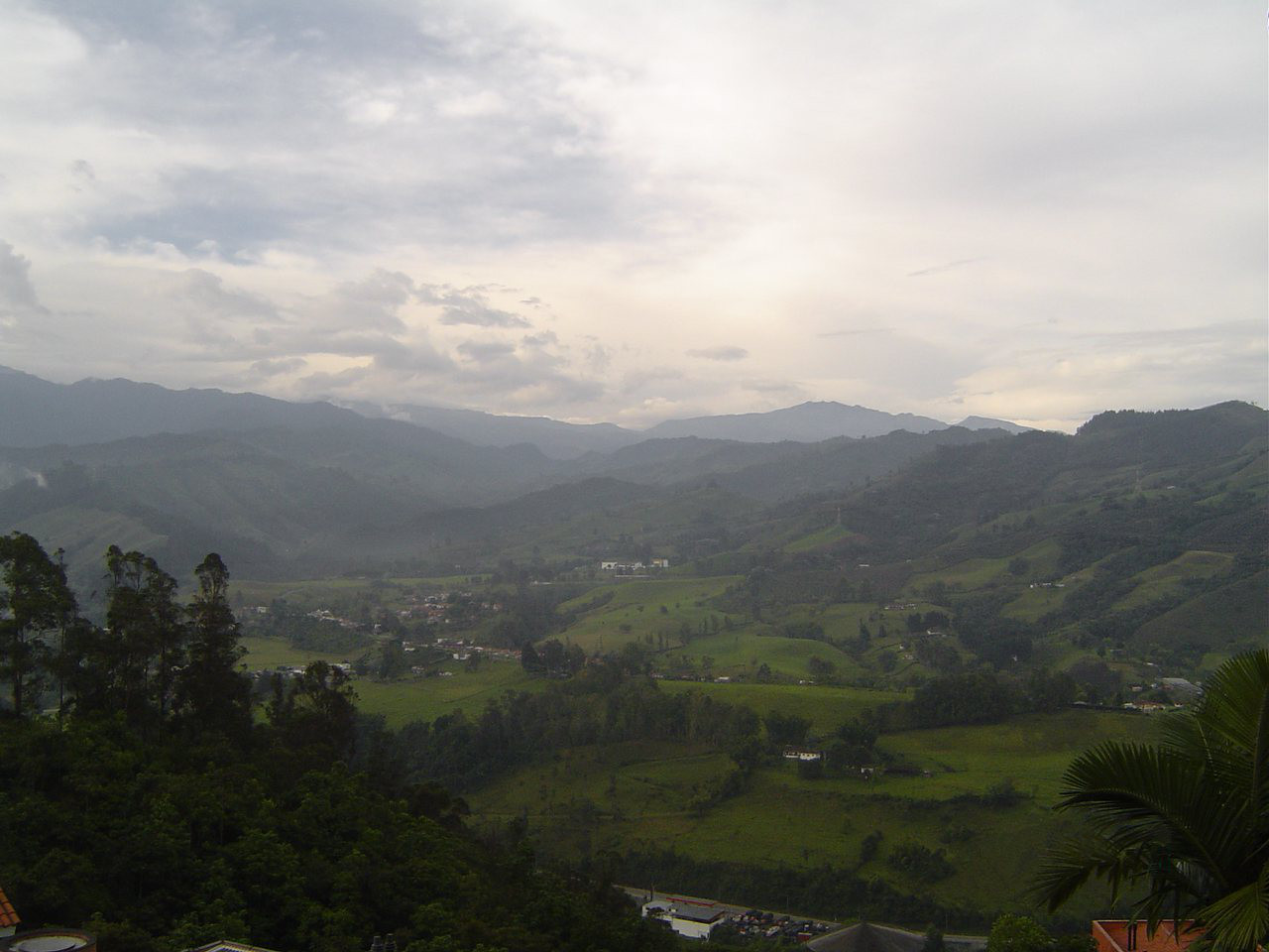 Foto panorámica de La Florida, ubicada en el municipio de Villamaría a pocos minutos de Manizales.